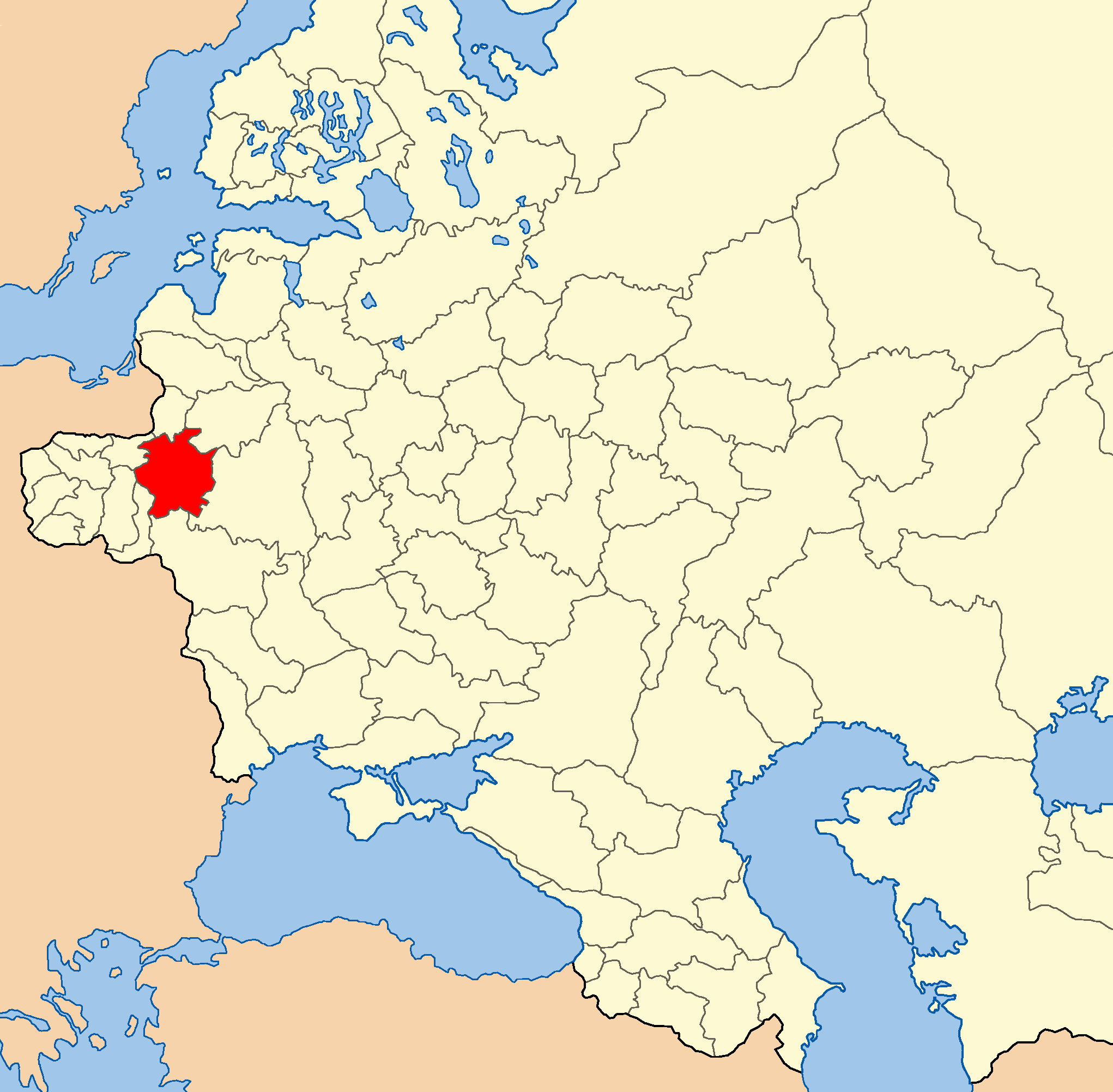 Расположение Гродненской губернии на карте западной части Российской империи